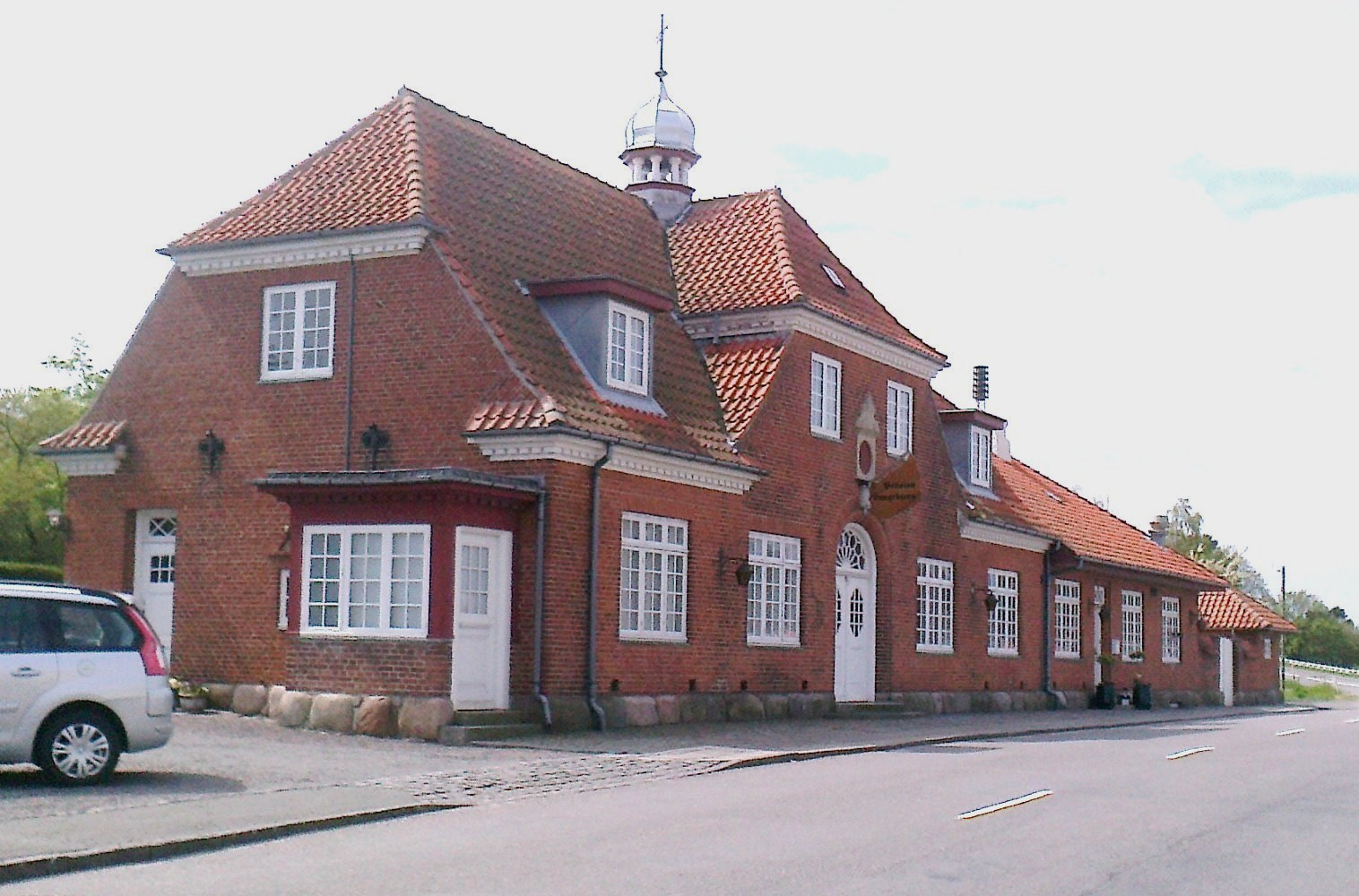 Sandvig Station, vejside